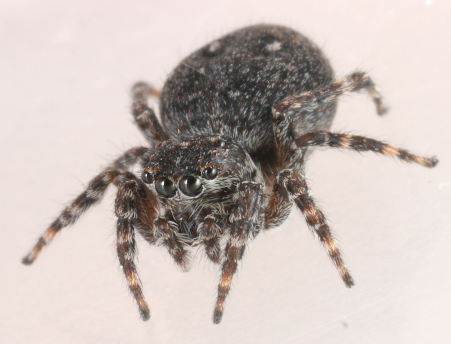 En eggfylt hunn av hoppeedderkoppen Sitticus terebratus. Template:Byline